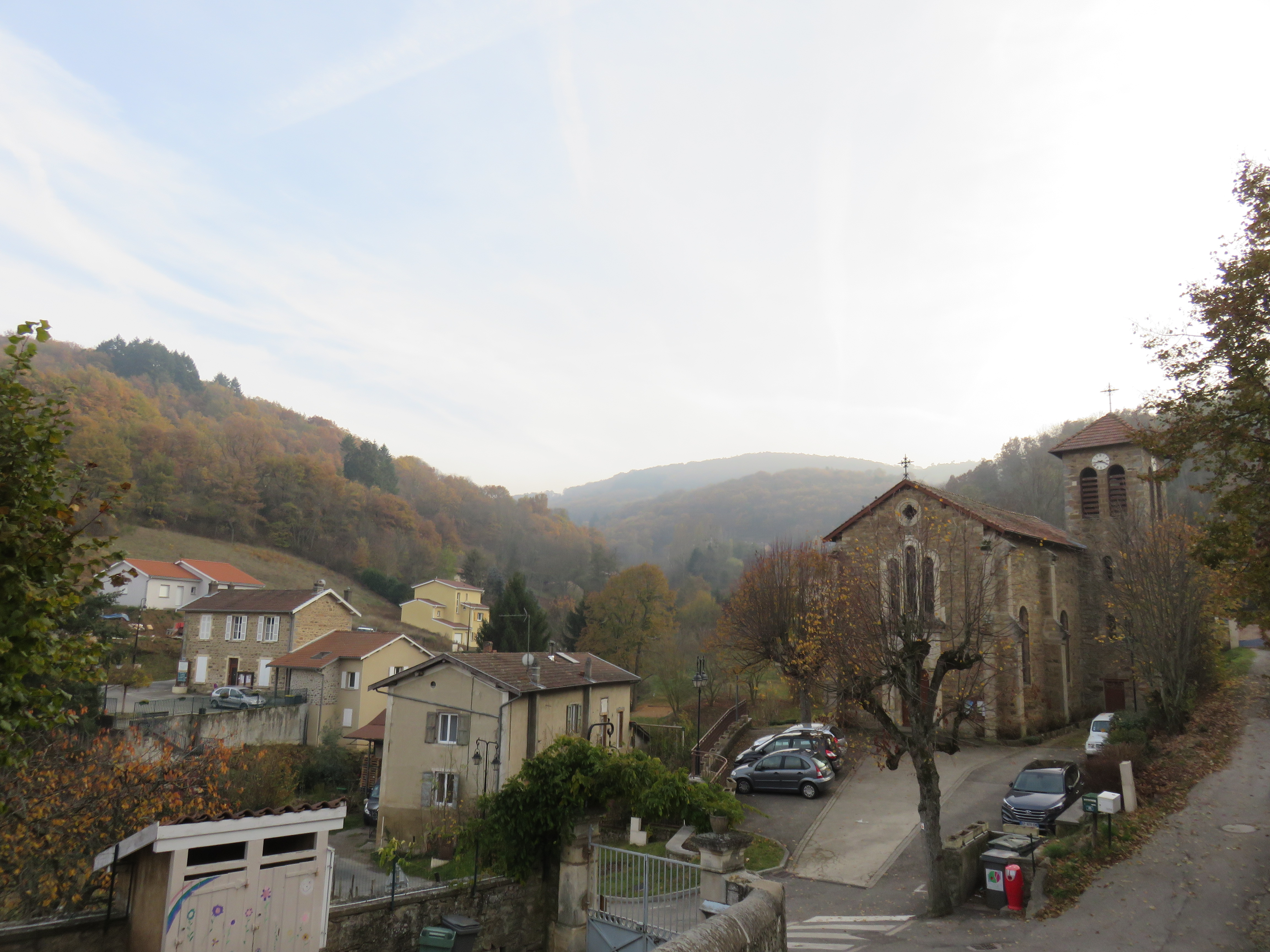 Vue de Saint-Laurent-de-Vaux (Vaugneray, Rhône, France).